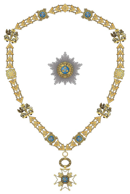 Triju Zvaigžņu ordenis